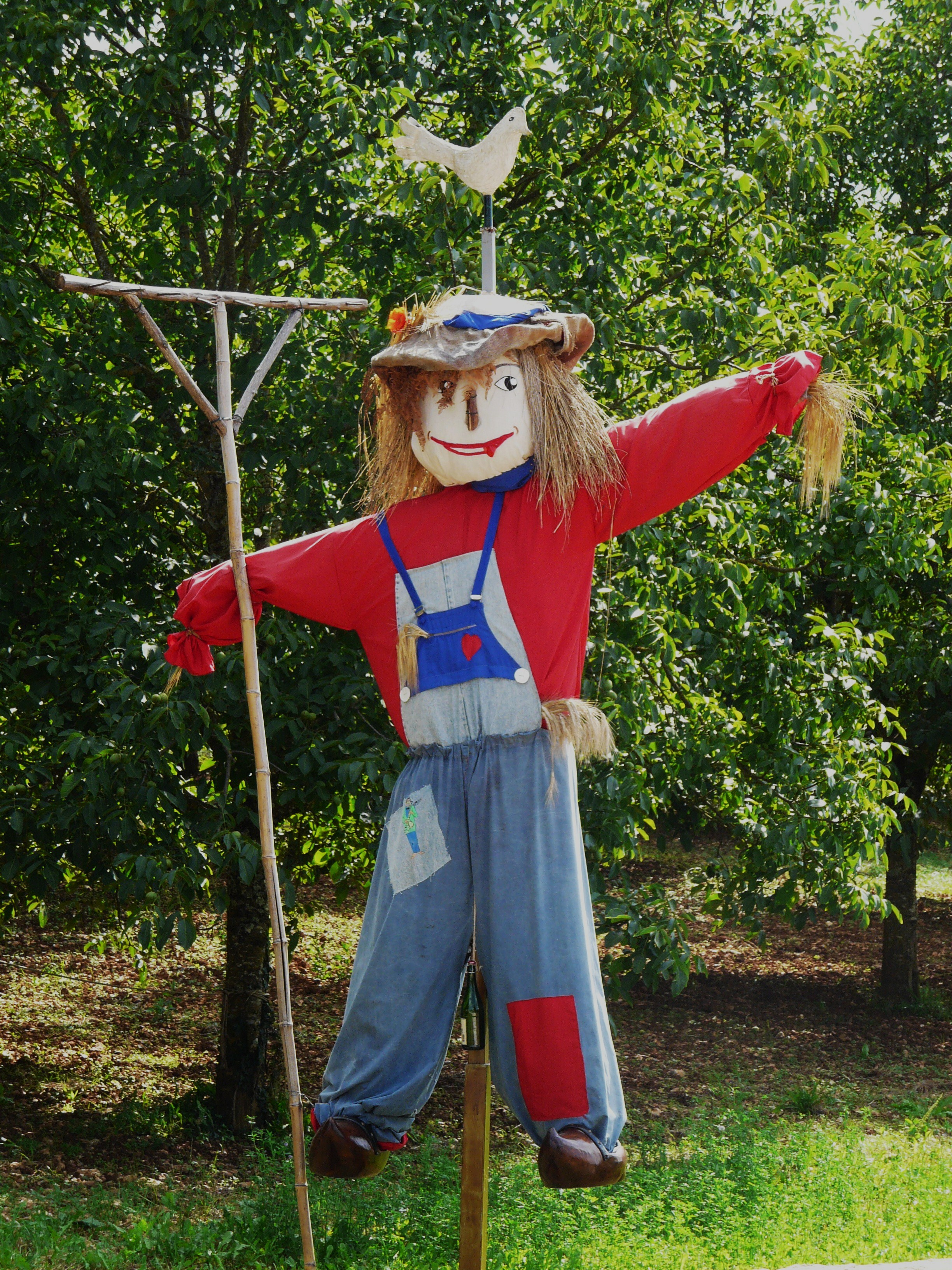 Festival des épouvantails 2014 de Meyrals, Dordogne, France.